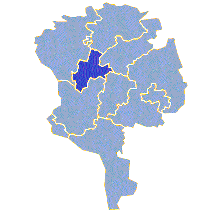 Powiat żarski - Gmina Tuplice